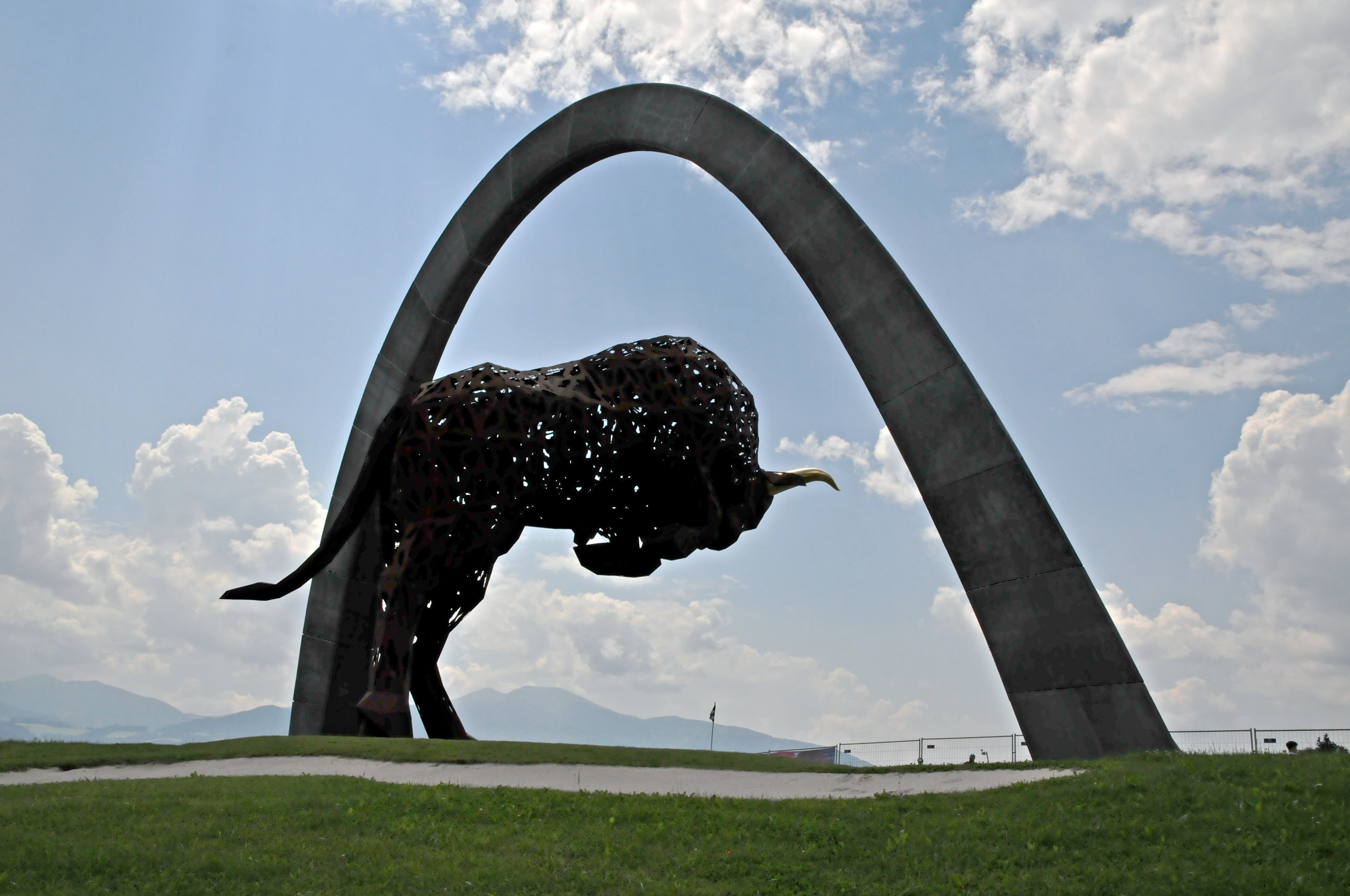 Formula One 2016 Austrian GP